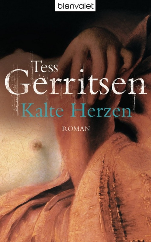 Tess Gerritsen: Kalte Herzen. Blanvalet, München 2003. DNB